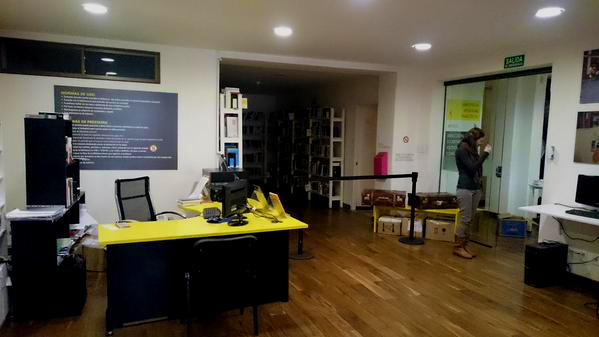 biblioteca y sala de lectura del Centro Cultural de España en Bolivia